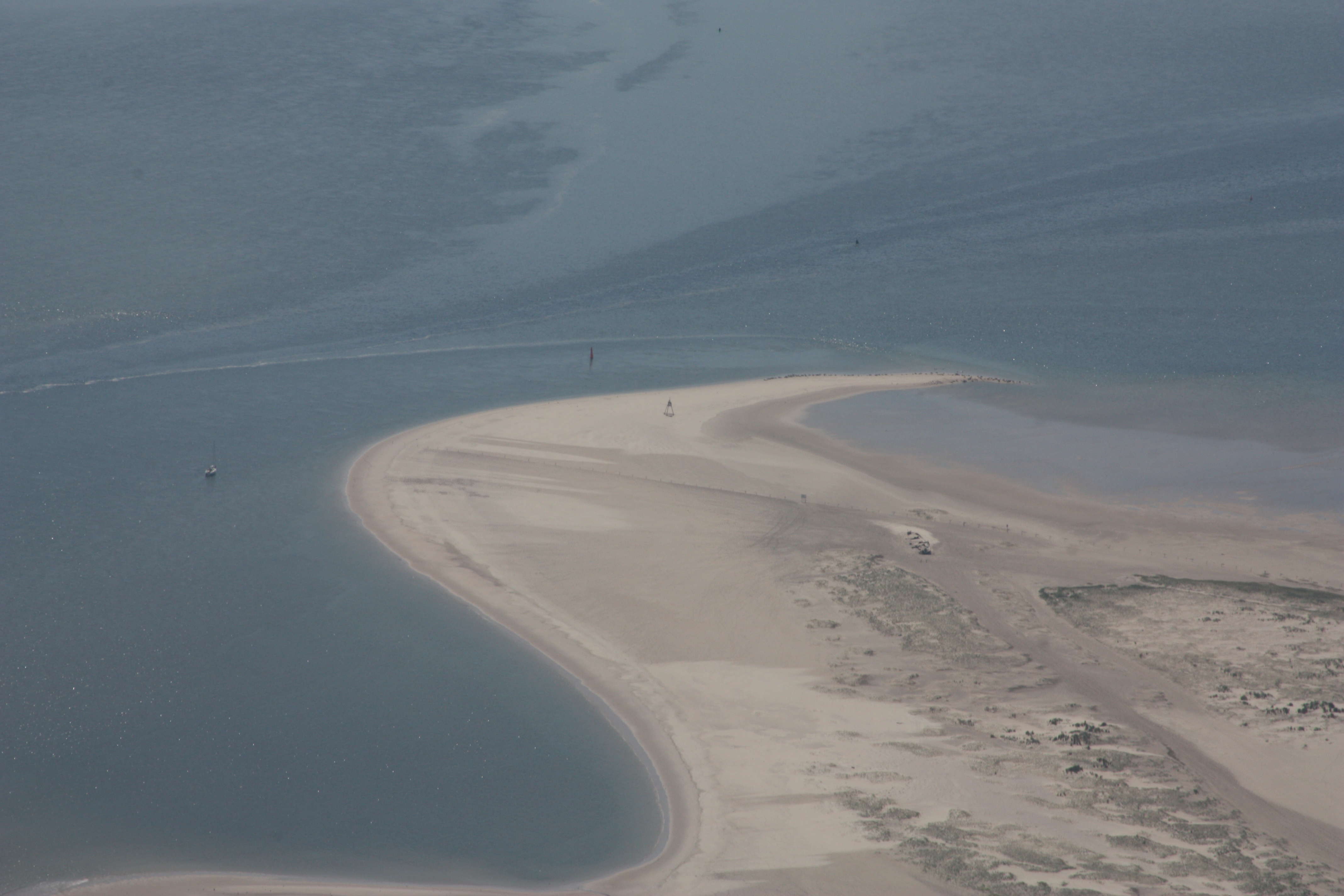 Flug über Norderney - von WEsten kommend, am Nordstran entlang; Flughöhe 500 m = 1500 ft; Juli 2010